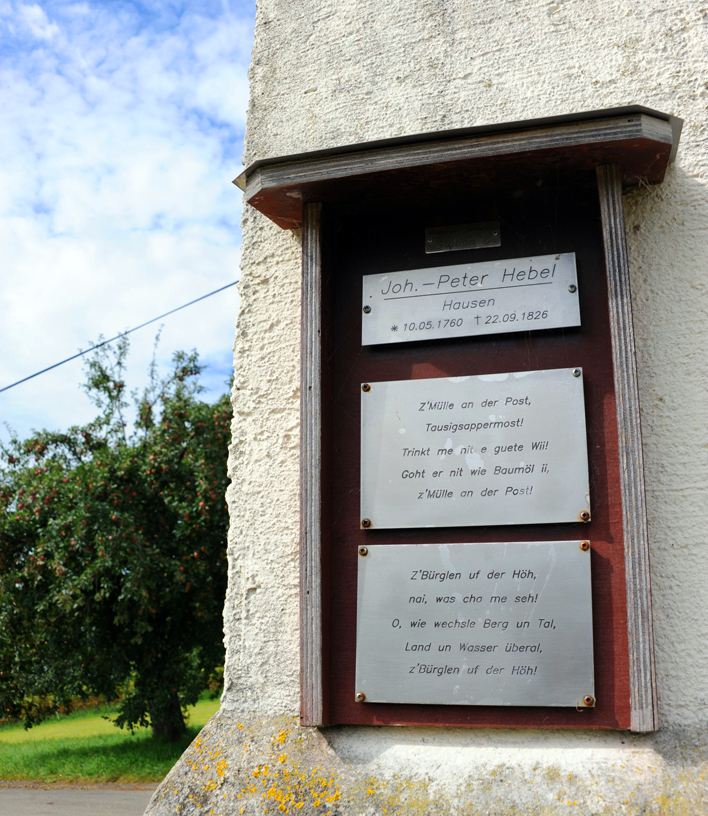 Station 06 auf dem Feldberger Dichterwegli, einem Lehrpfad in Müllheim-Feldberg im Markgräflerland auf dem Gedichtstafeln mit Versen alemannischer Mundartdichter zu sehen sind. Diese Tafel enthält einen Auszug aus einem Gedicht von Johann-Peter Hebel aus Hausen im Wiesental.